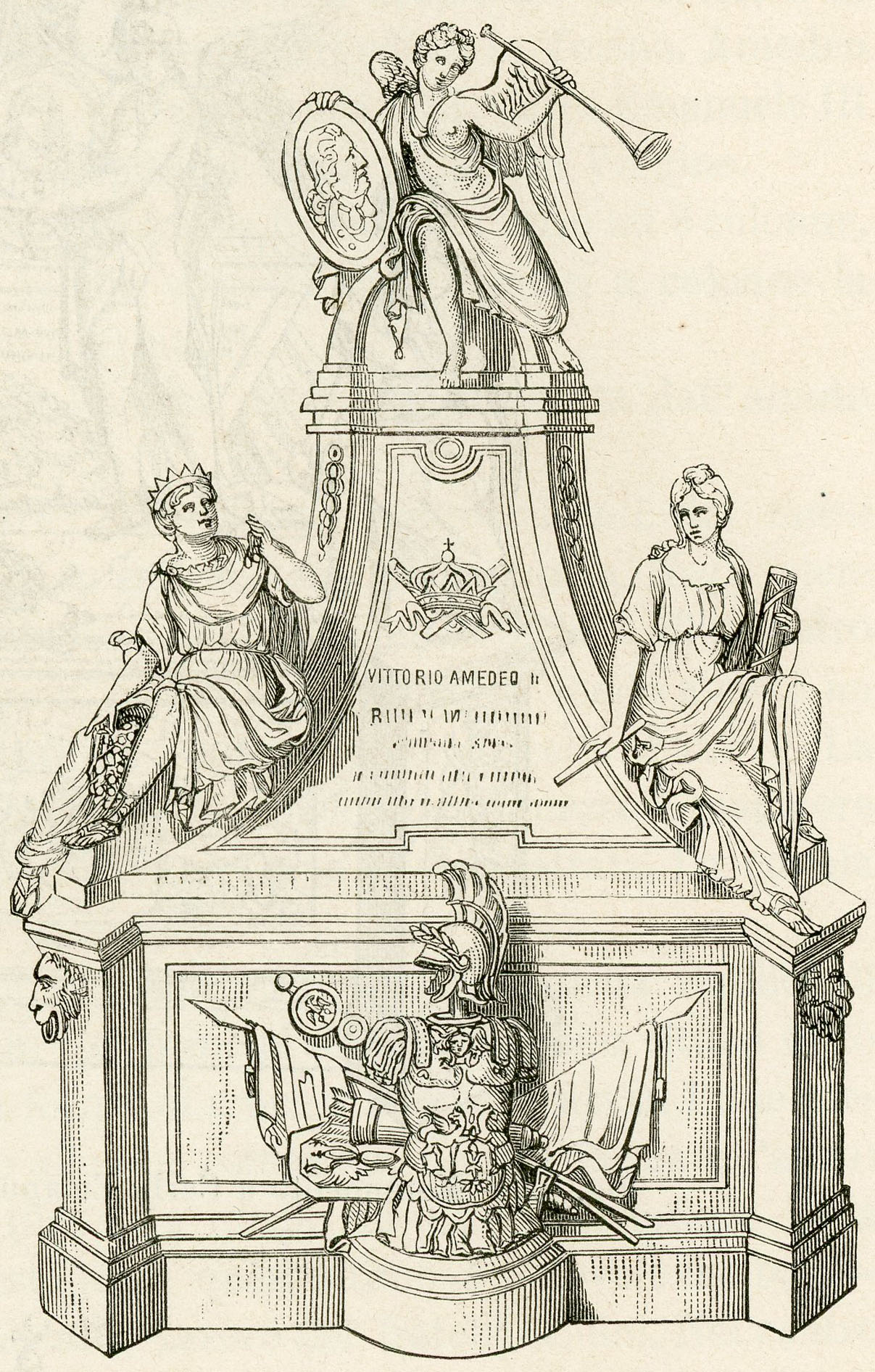 Monumento a Vittorio Amedeo II nella R. Basilica di Superga (xilografia).